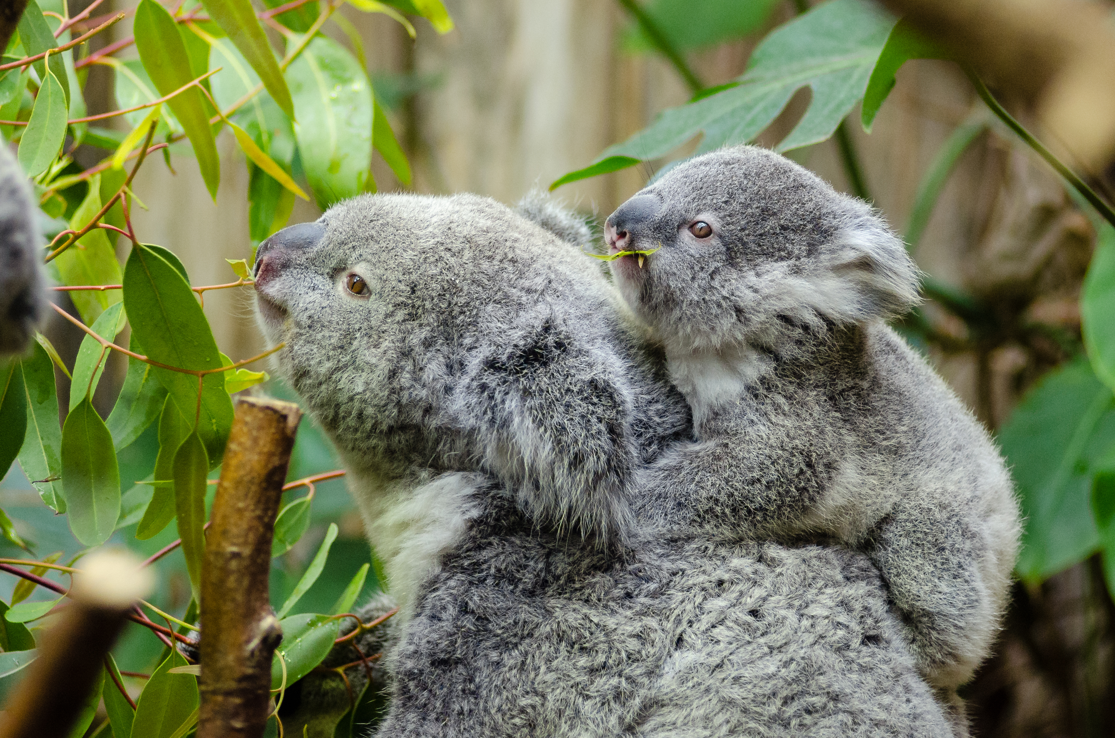 koala